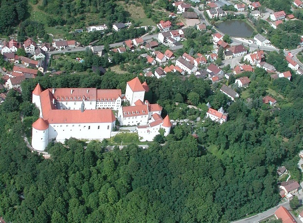 Luftbild Schloss Wörth Donau